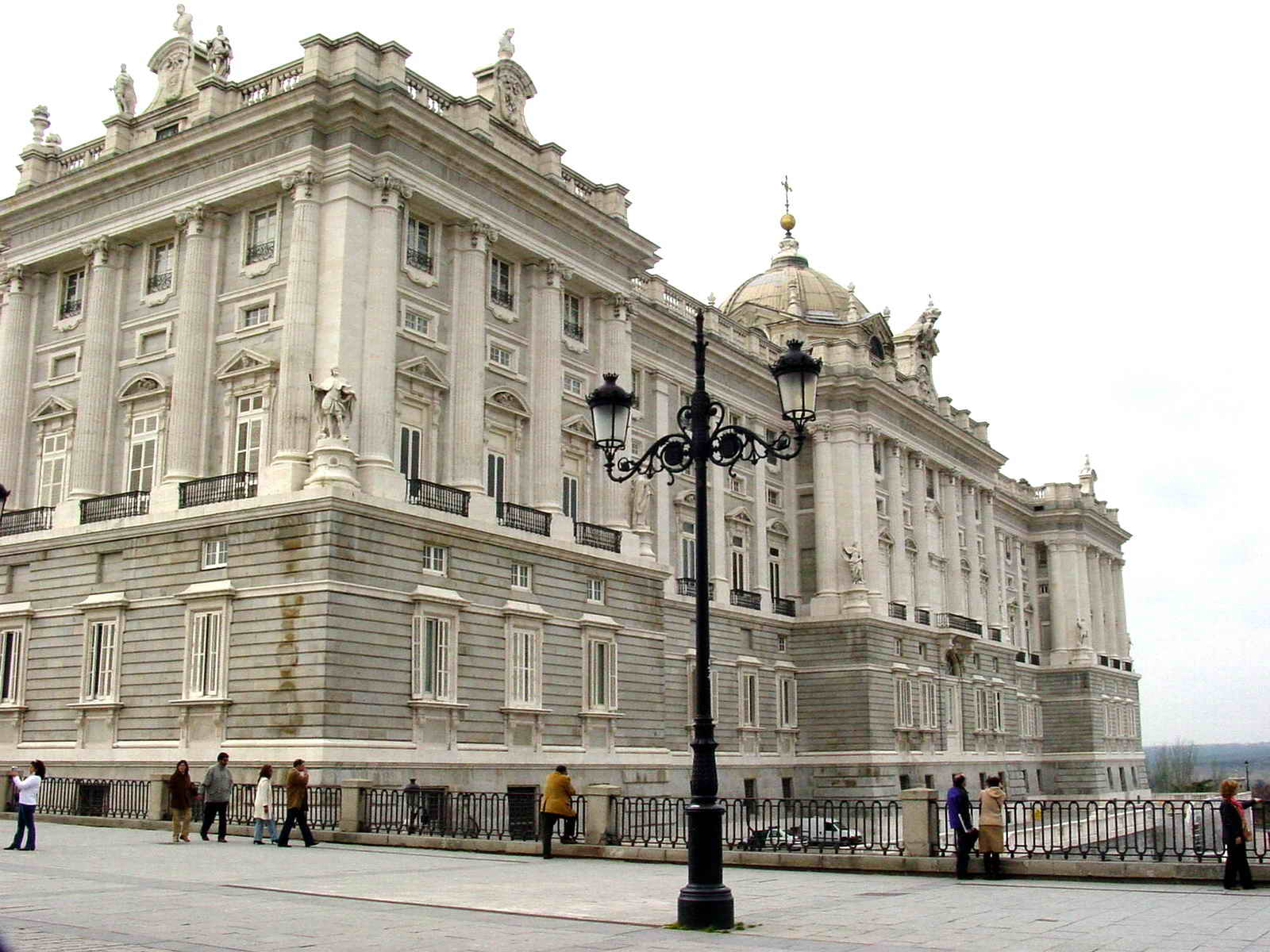 Madrid - Spain